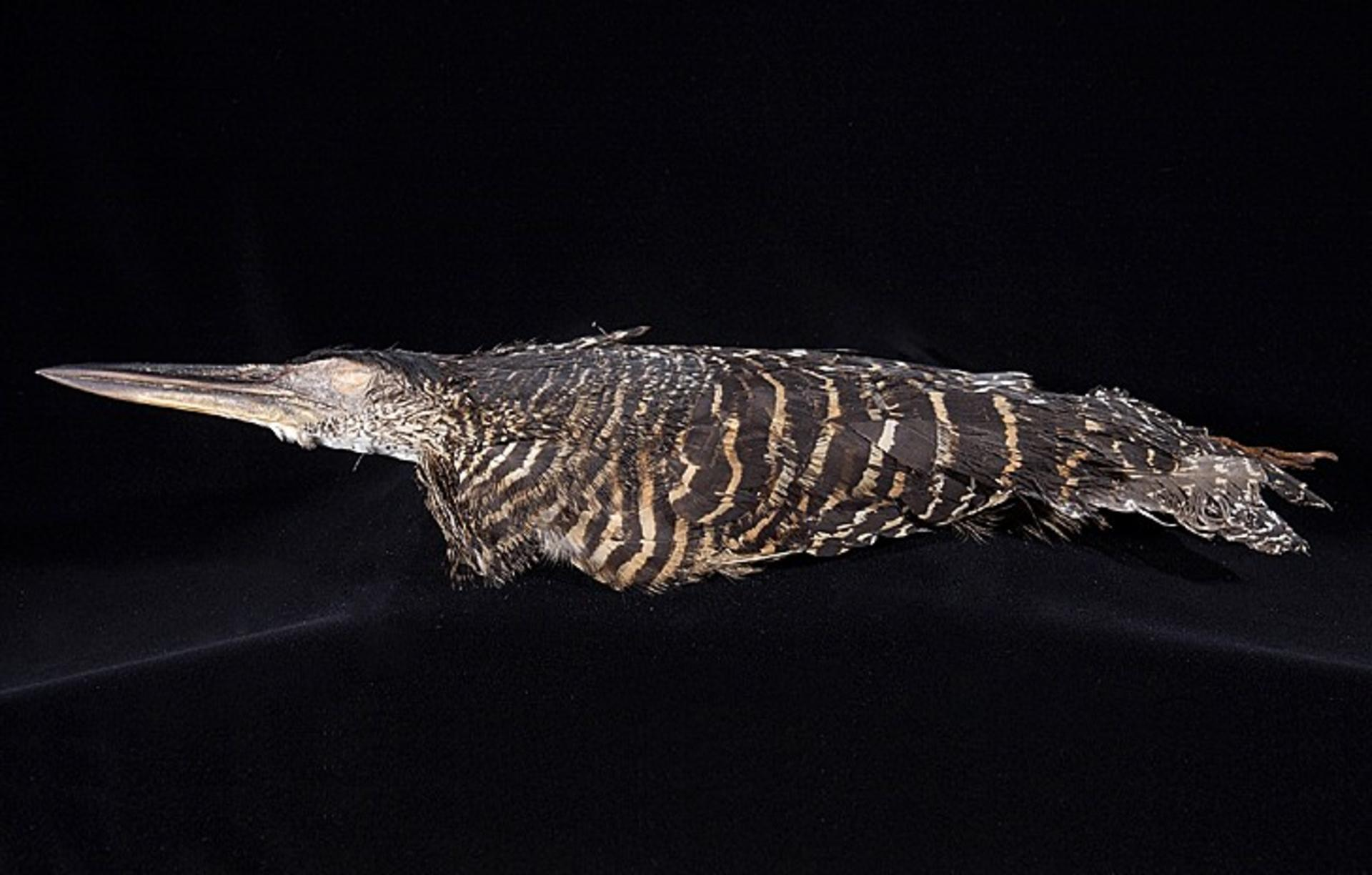 Zonerodius heliosylus Lesson, 1828